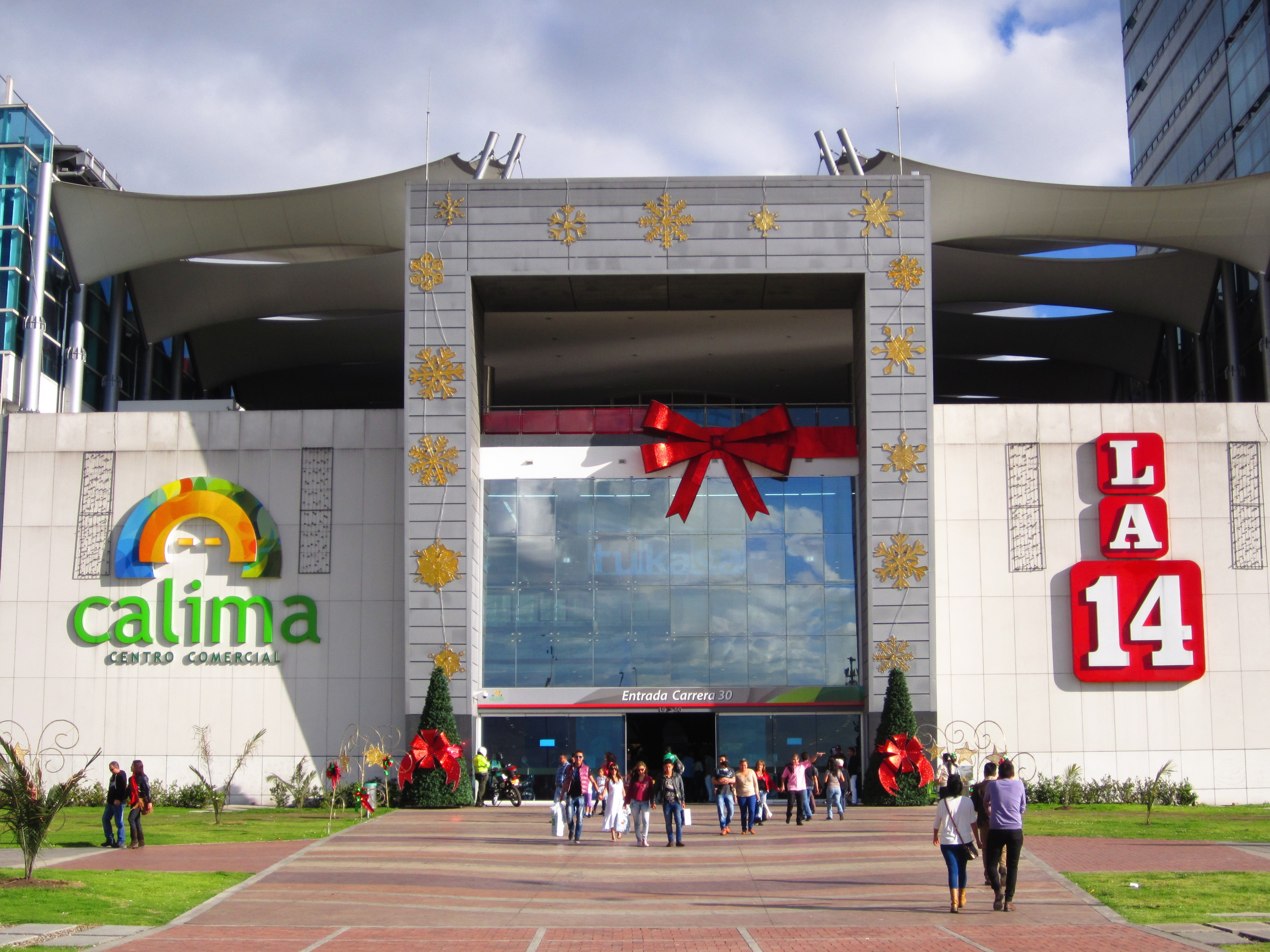 Entrada principal del centro comercial Calima en Bogotá. Avenida NQS.